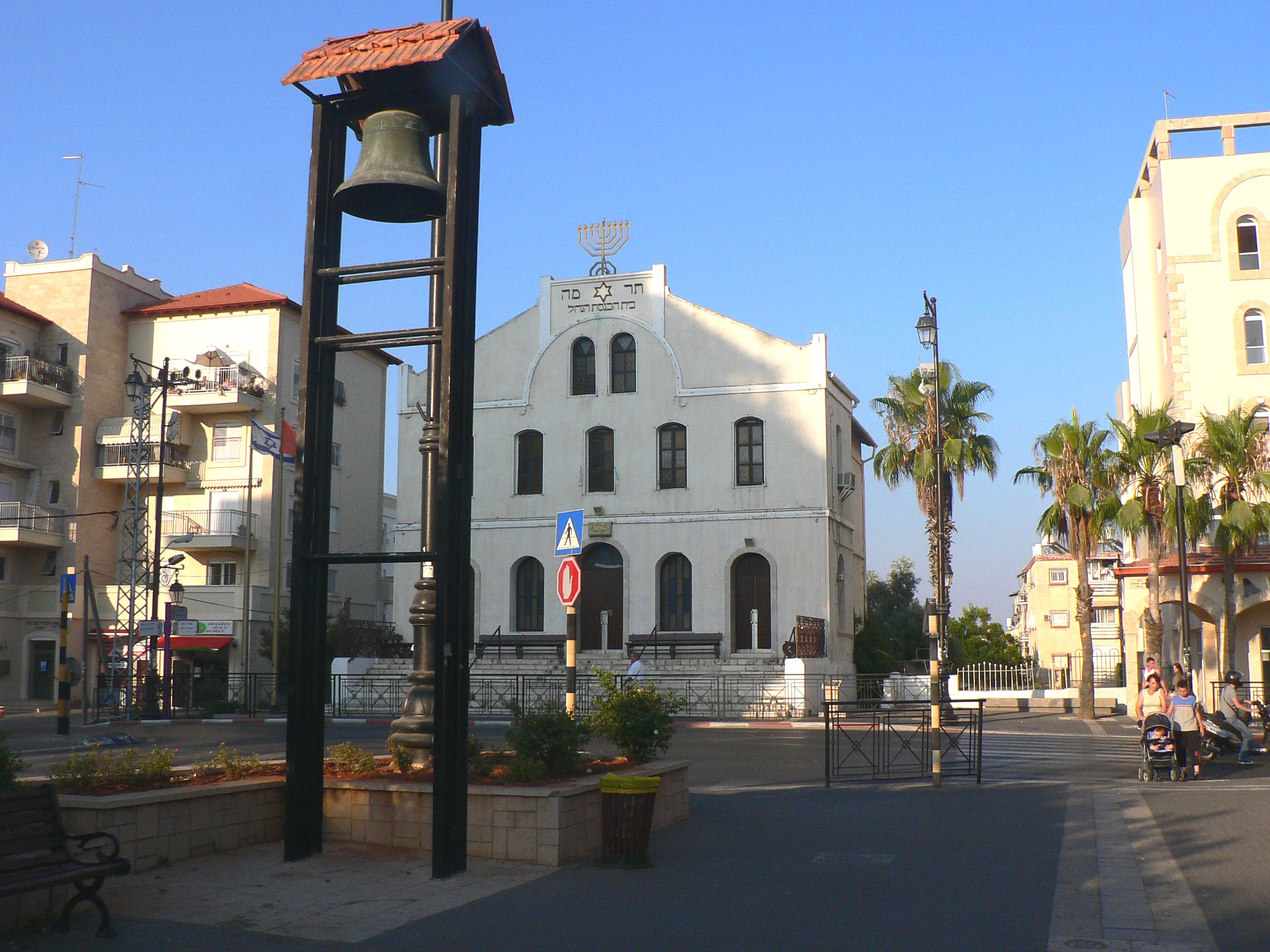 Kikar HaMeyasdim, Rishon LeZion, Israel (brightened version) כיכר המייסדים (בית הכנסת הגדול ופעמון האזעקה העתיק), ראשון לציון, ישראל